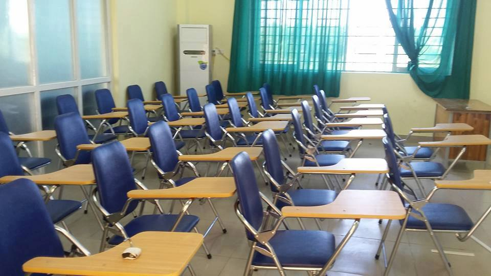 Một phòng học chuyên tiếng Anh